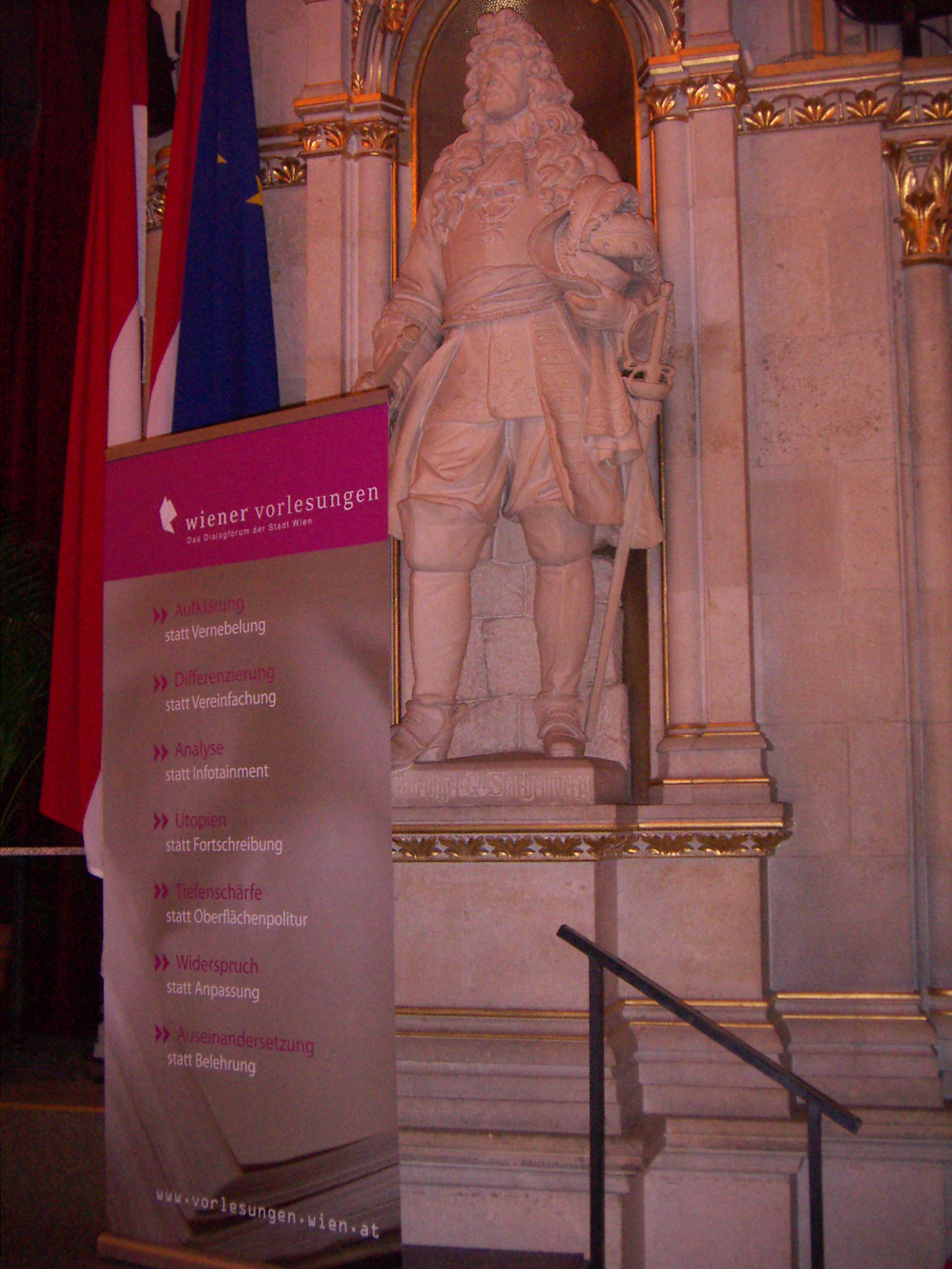 Wiener Vorlesungen in Wien im Rathaus im Festsaal.